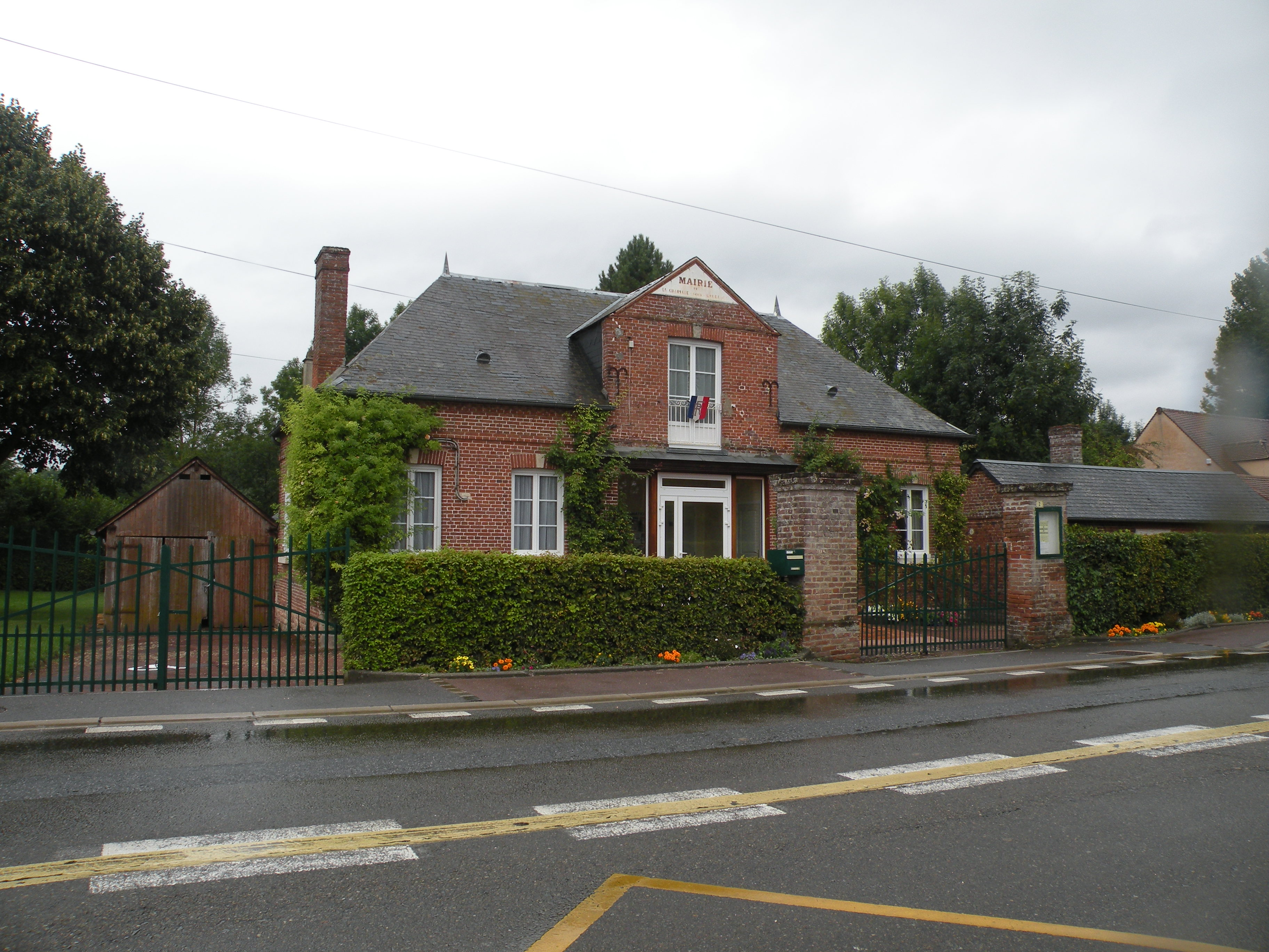 Lachapelle-sous-Gerberoy mairie